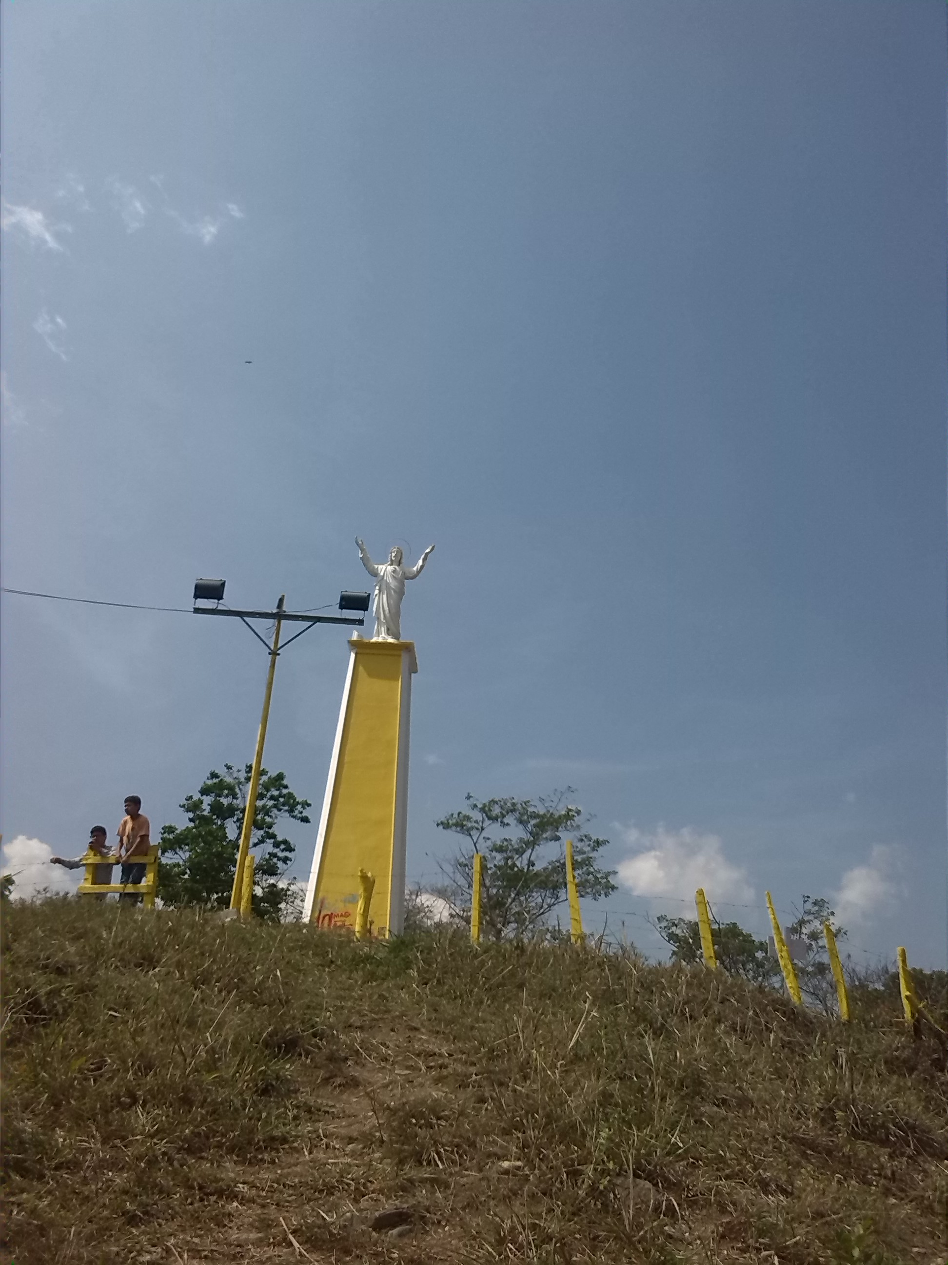 naturaleza